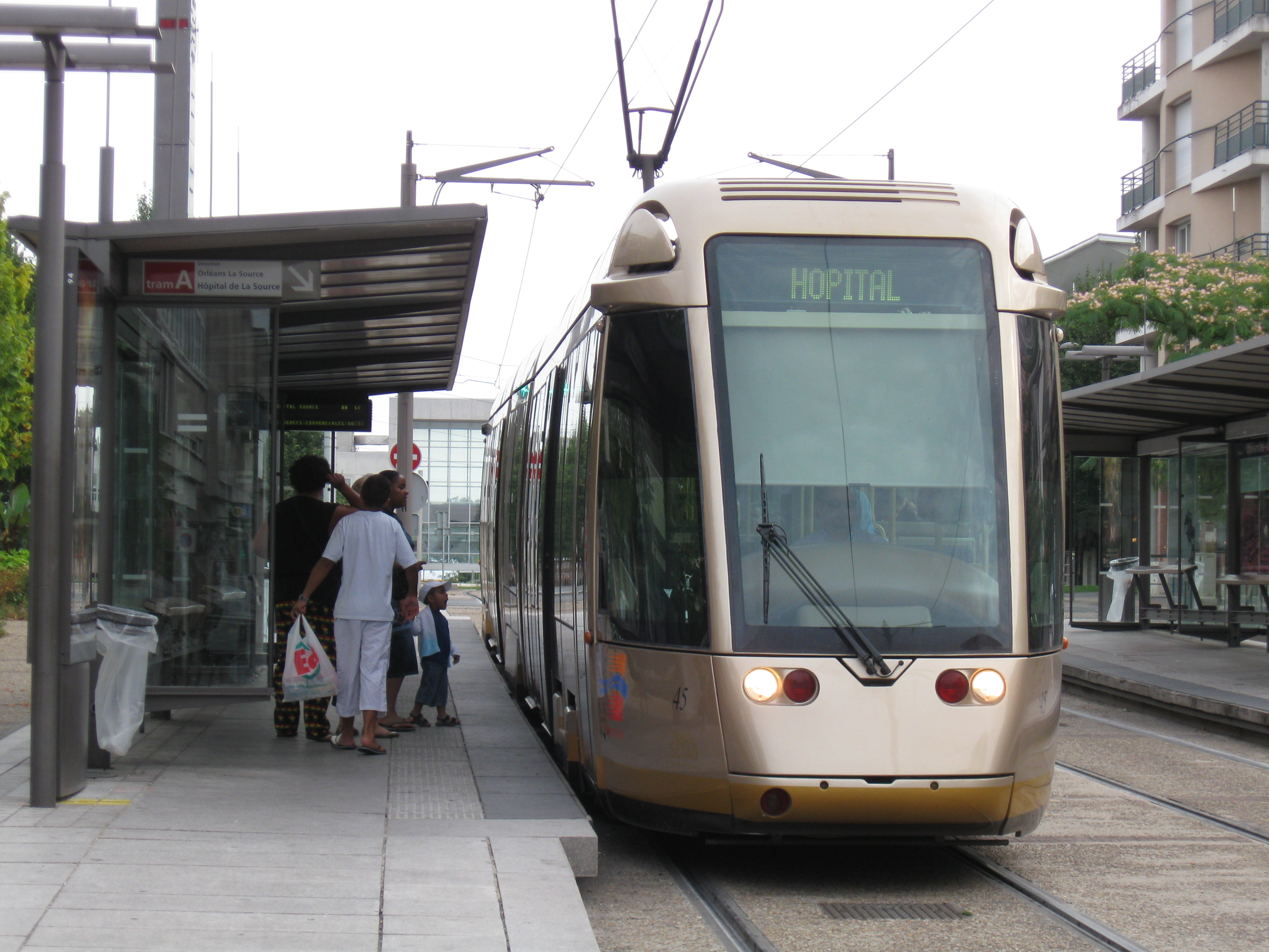 Station Université L'Indien du tramway d'Orléans, Orléans, Loiret, France